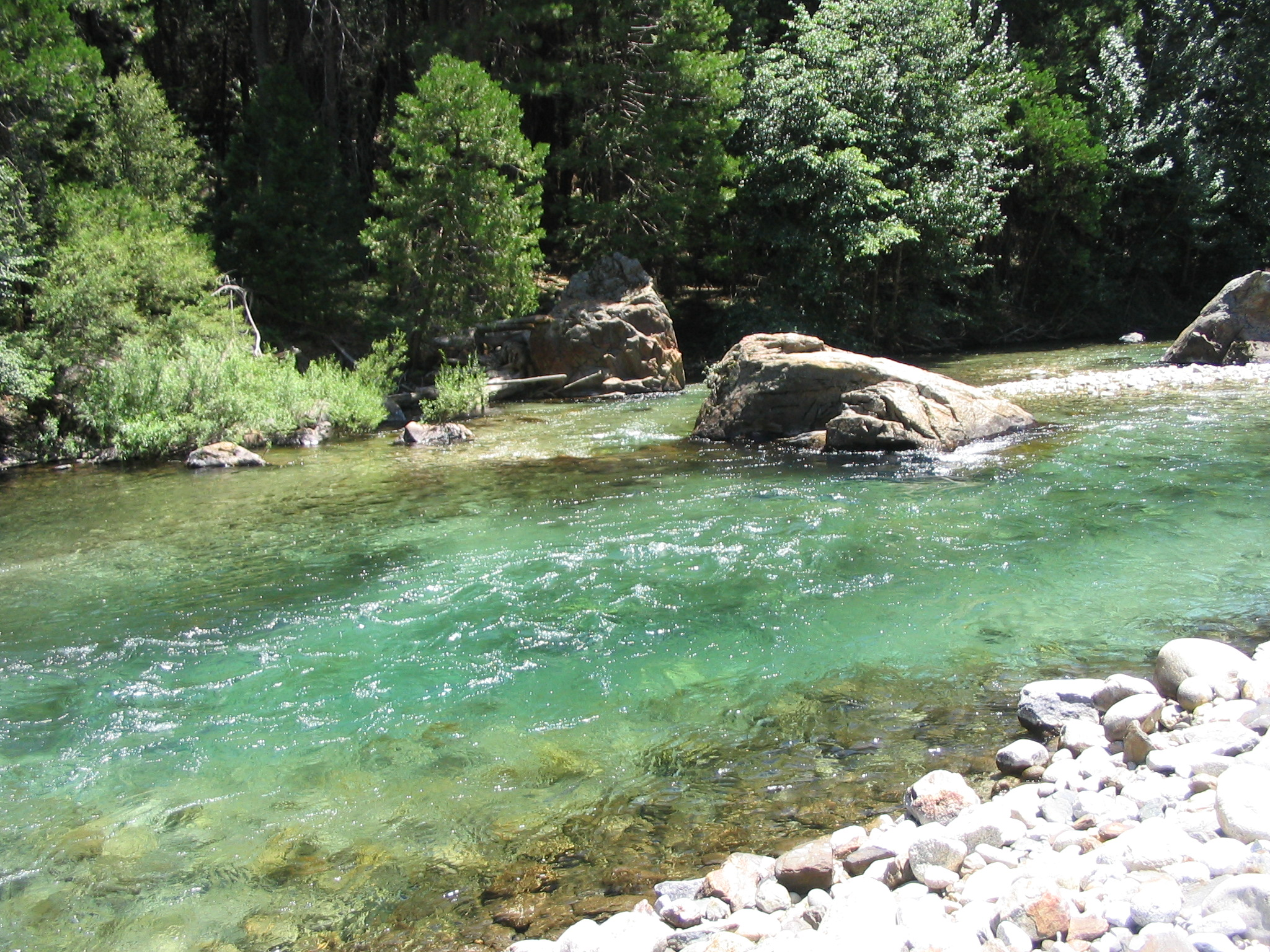 Middle Fork Kings River